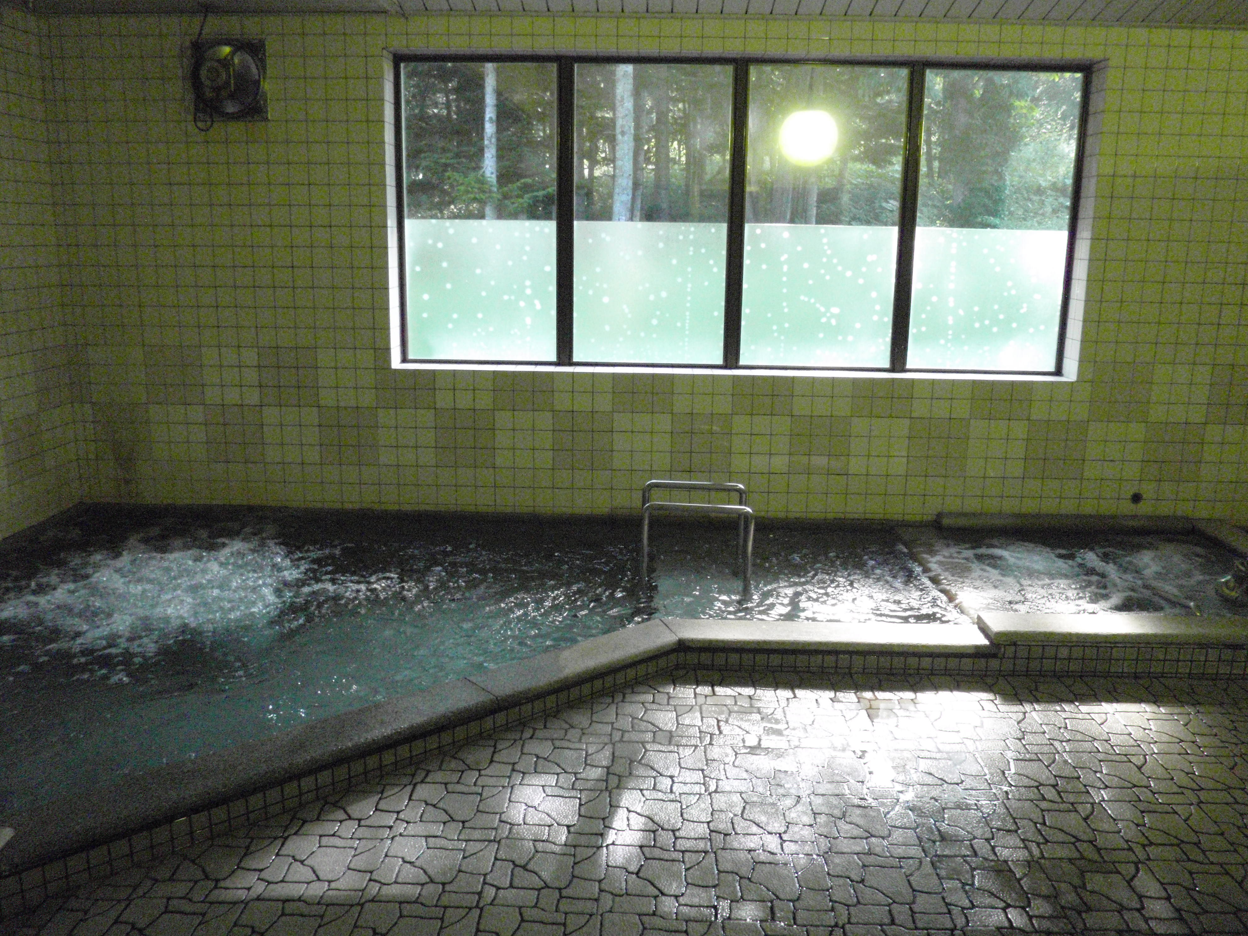 協和温泉浴室。右が温泉浴槽、左が水道水の沸かし湯。